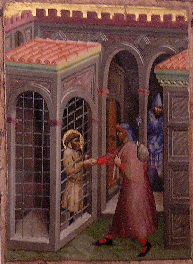 Sono io l'autore della foto. Rappresenta una tempera su tavola di Olivuccio di Ciccarello conservata nella Pinacoteca Vaticana. Fa parte della serie delle Opere di misericordia ed è intitolata: "Dare conforto ai carcerati". Era precedentemente attribuita a Carlo da Camerino. La foto non è purtroppo di buona qualità. Se ne avete una migliore sostituitela (nella Pinacoteca Vaticana è consentito fotografare le opere esposte)--Gep (msg) 18:24, 18 feb 2012 (CET).